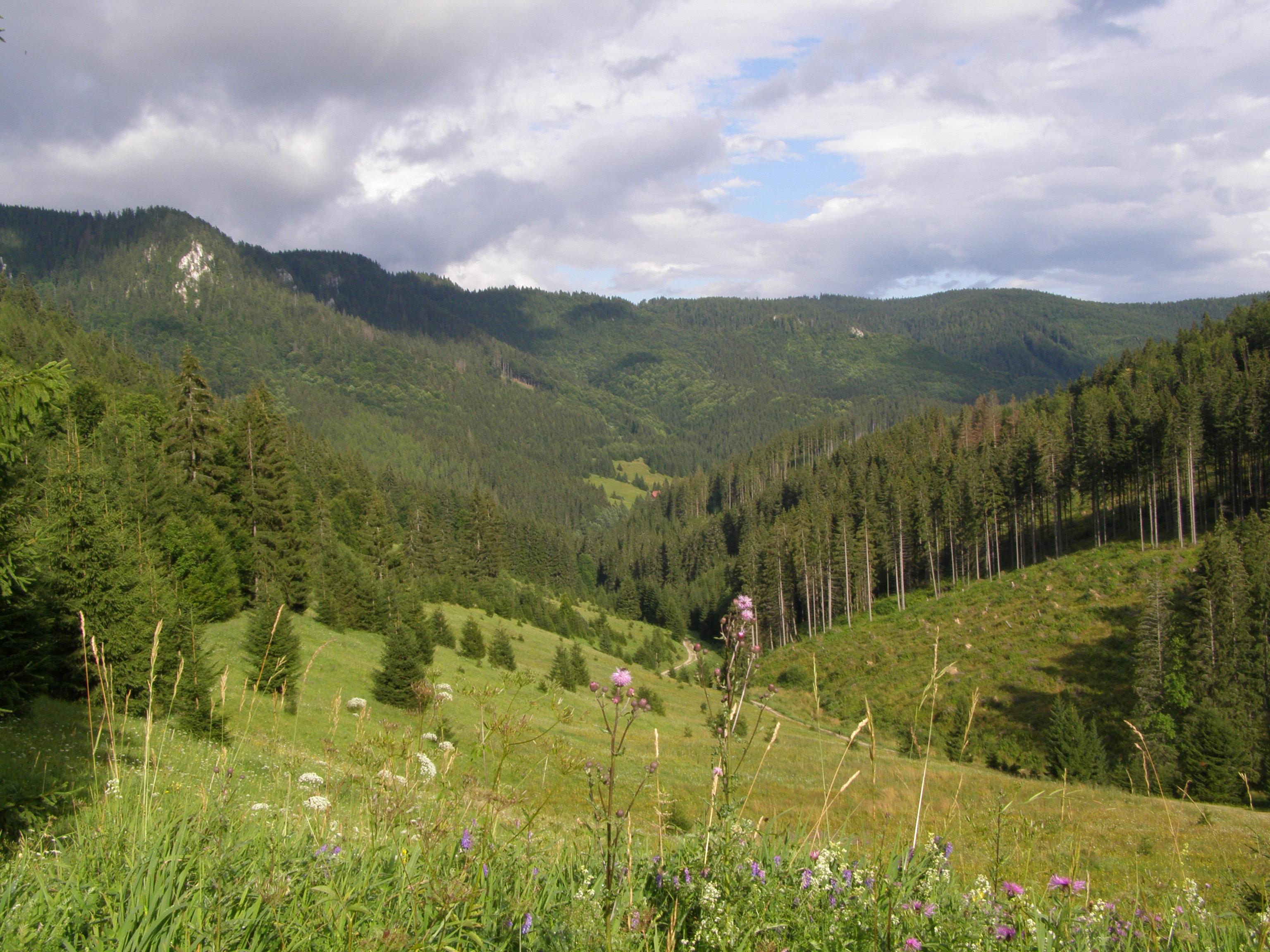 Slovenské rudohoří, Spišsko-gemerský kras, Muráňská planina, pohled ze sedla Randavica na východ do údolí říčky Hronec, v pozadí skály vrcholu Veľká Stožka (1297 m, vlevo) a Nižná Kľaková